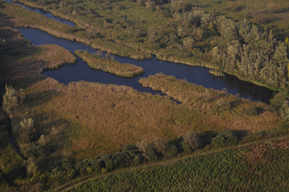 A Király-tó a Hanságban, Kapuvár mellett, Győr-Moson-Sopron megye